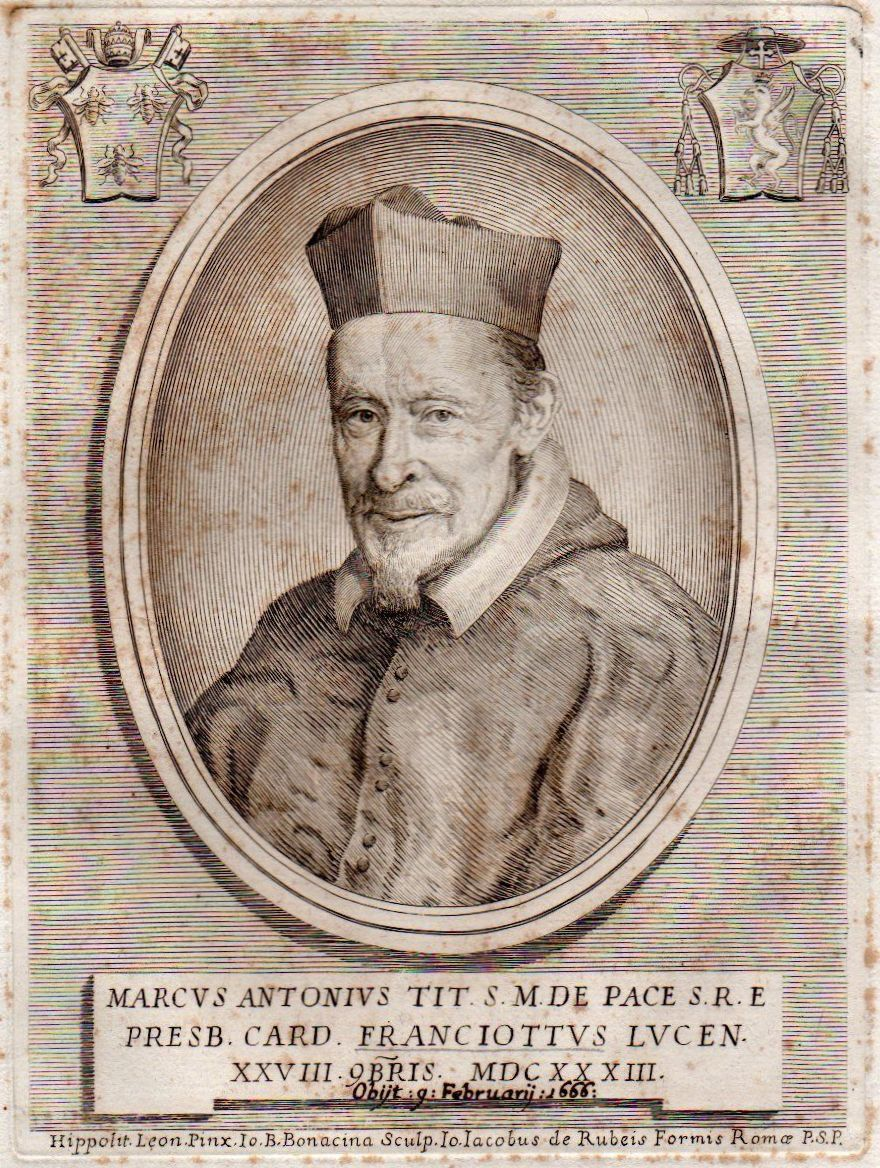 Incisione a bulino originale del XVIII secolo Dimensioni Battuta 19x14 ca., con margini 33x23